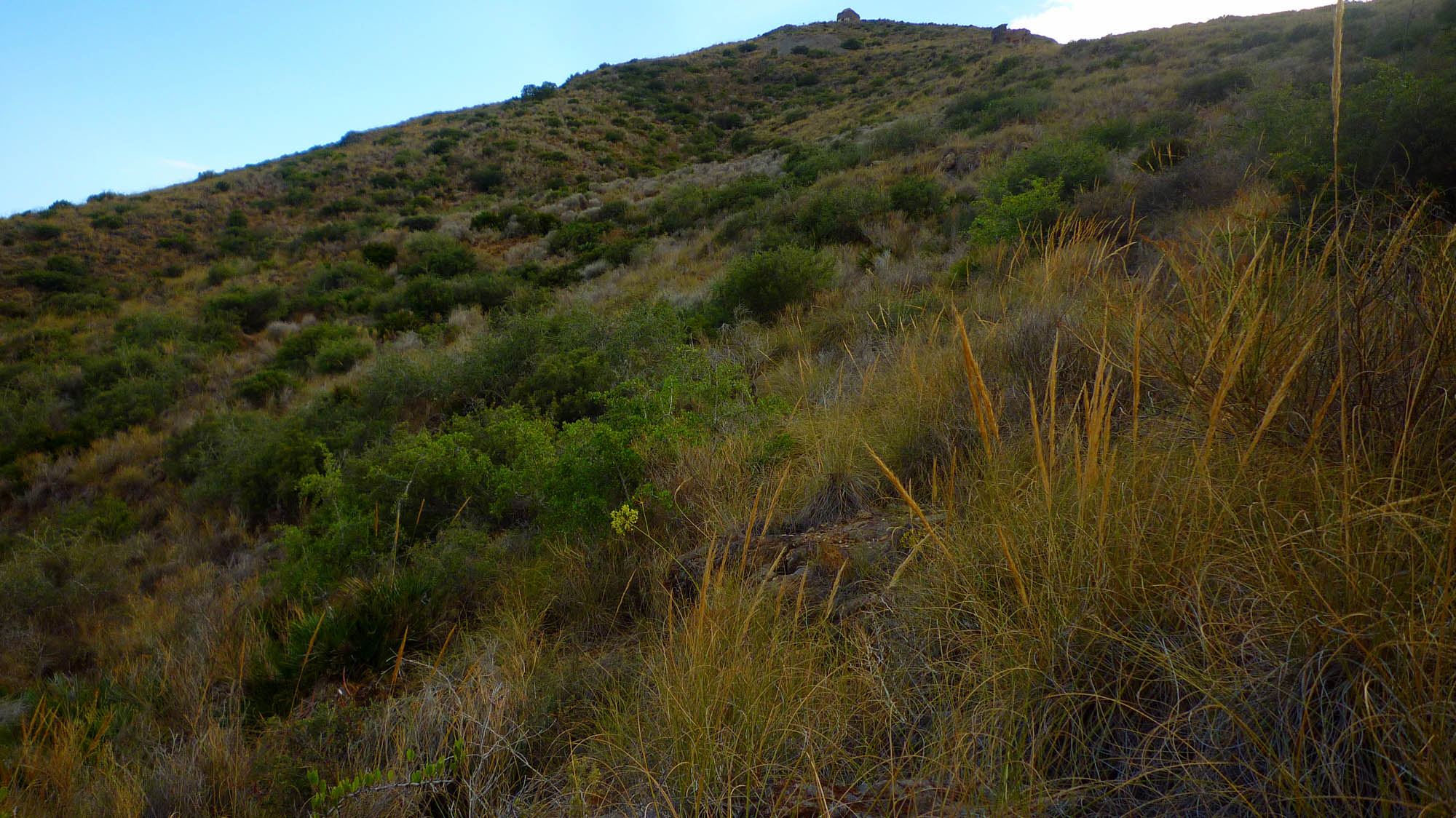 Cabezo de San Ginés, espacio protegido en el entorno del Mar Menor, Cartagena (España).